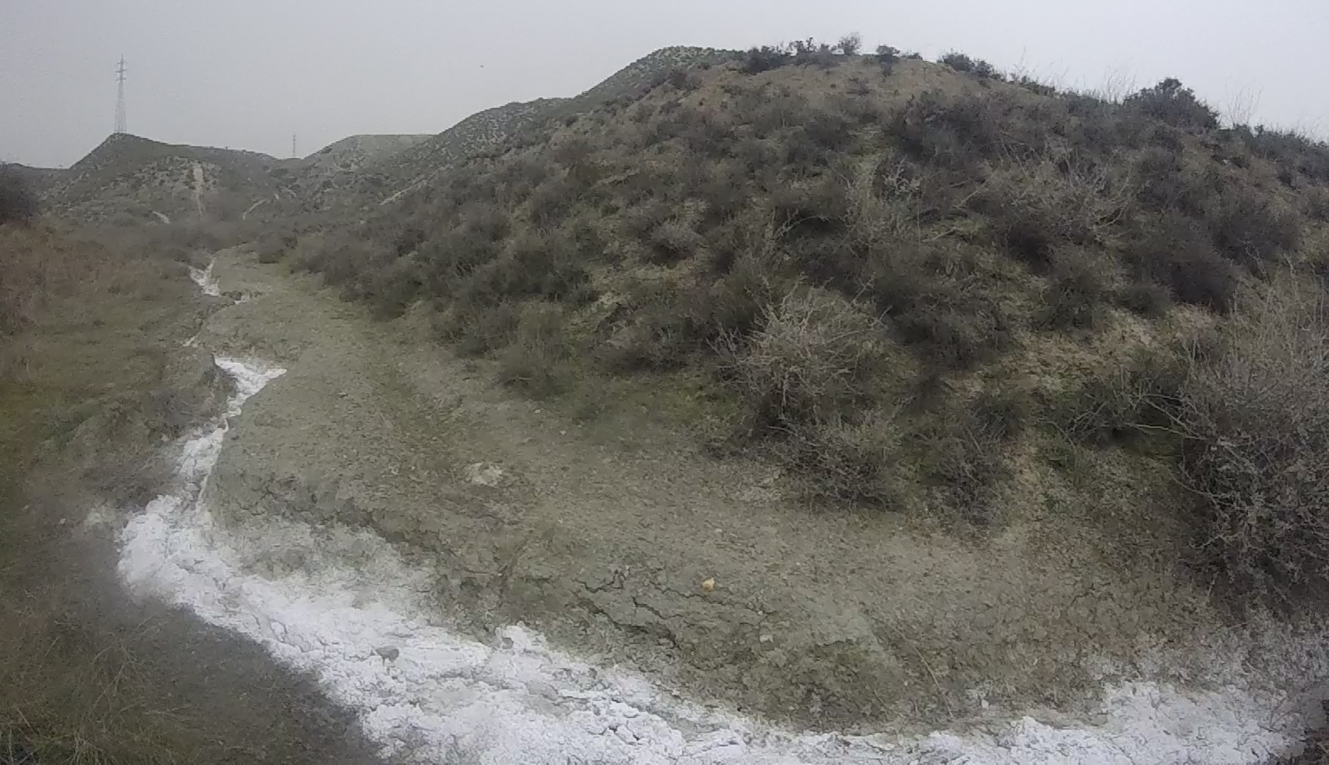 En el municipio de Ciempozuelos se localiza una de las explotaciones de sal más antiguas de la Península. Las salinas son de sulfatos sódicos (Mirabilita/Thenardita) solubles en ambientes fríos. Se empezó a explotar el sulfato sódico en el siglo 19, se obtenía la barrila o compasto (vidrio).